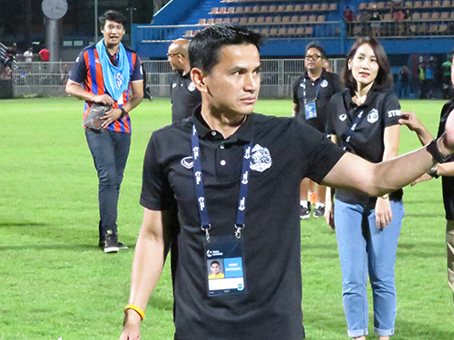 Kiatisuk Senamuang